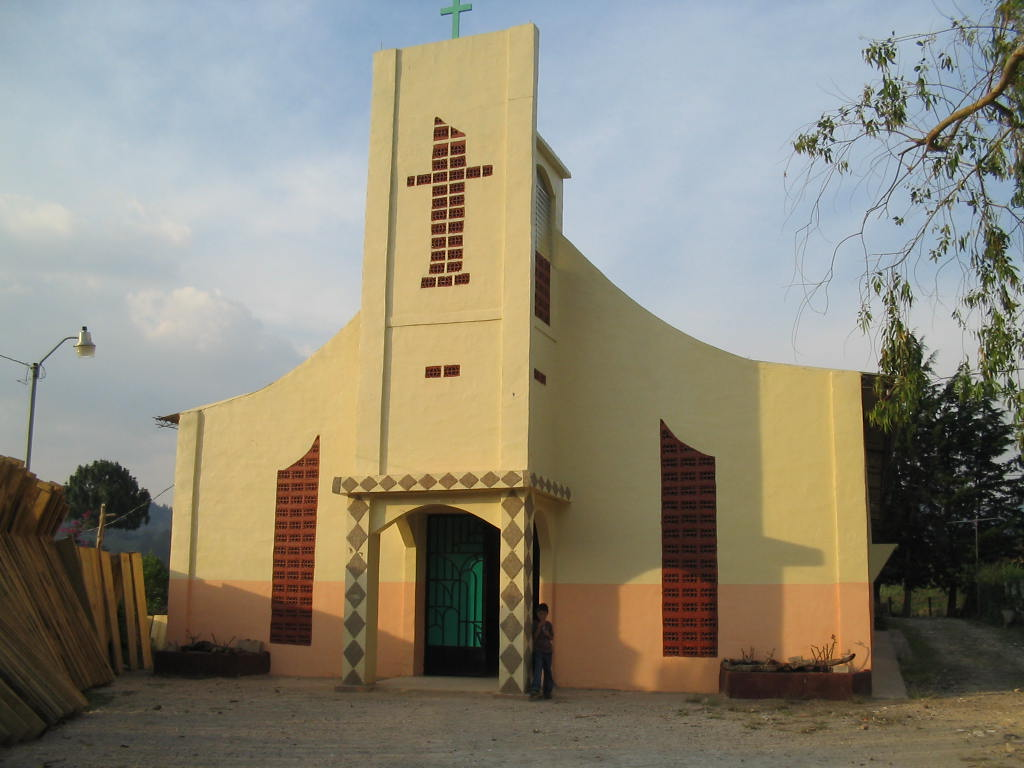 Iglesia del Canton Las Granadillas en San Ignacio, Chalatenango